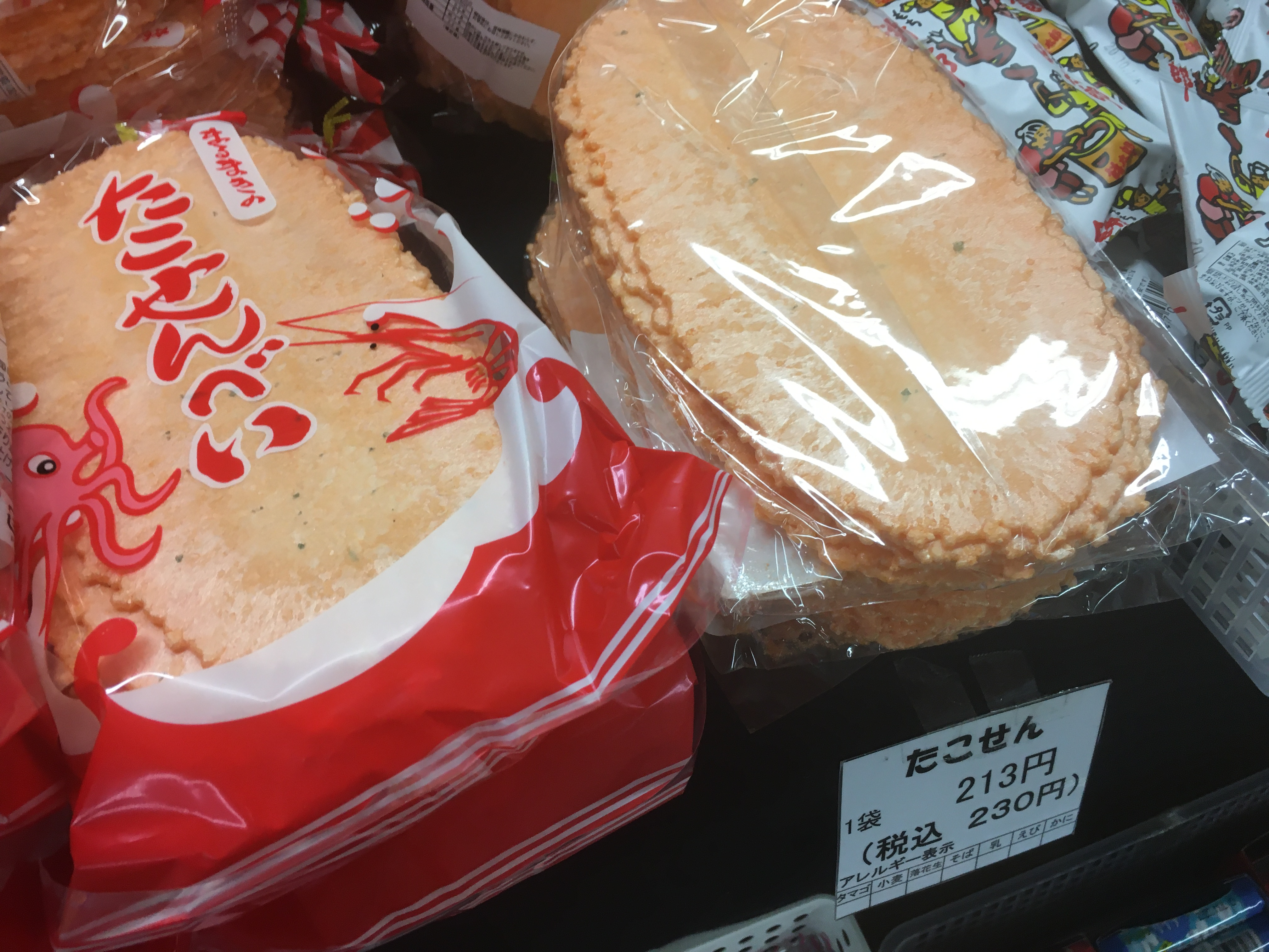 たこせんべい (tako senbei)